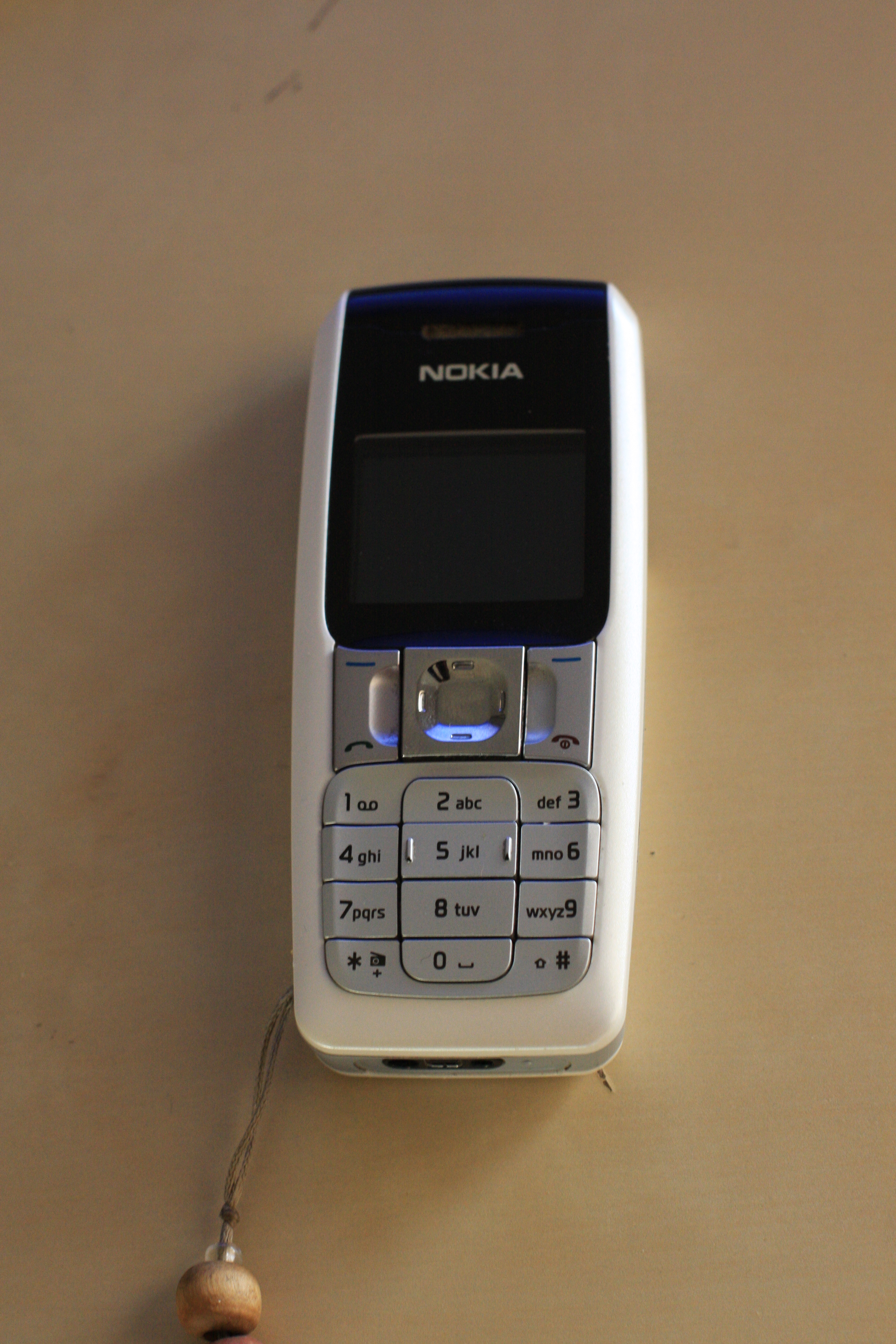 Nokia 2310 in Weiss/Schwarz